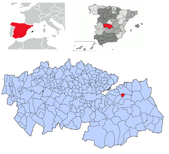 Cabañas de Yepes en la provincia de Toledo